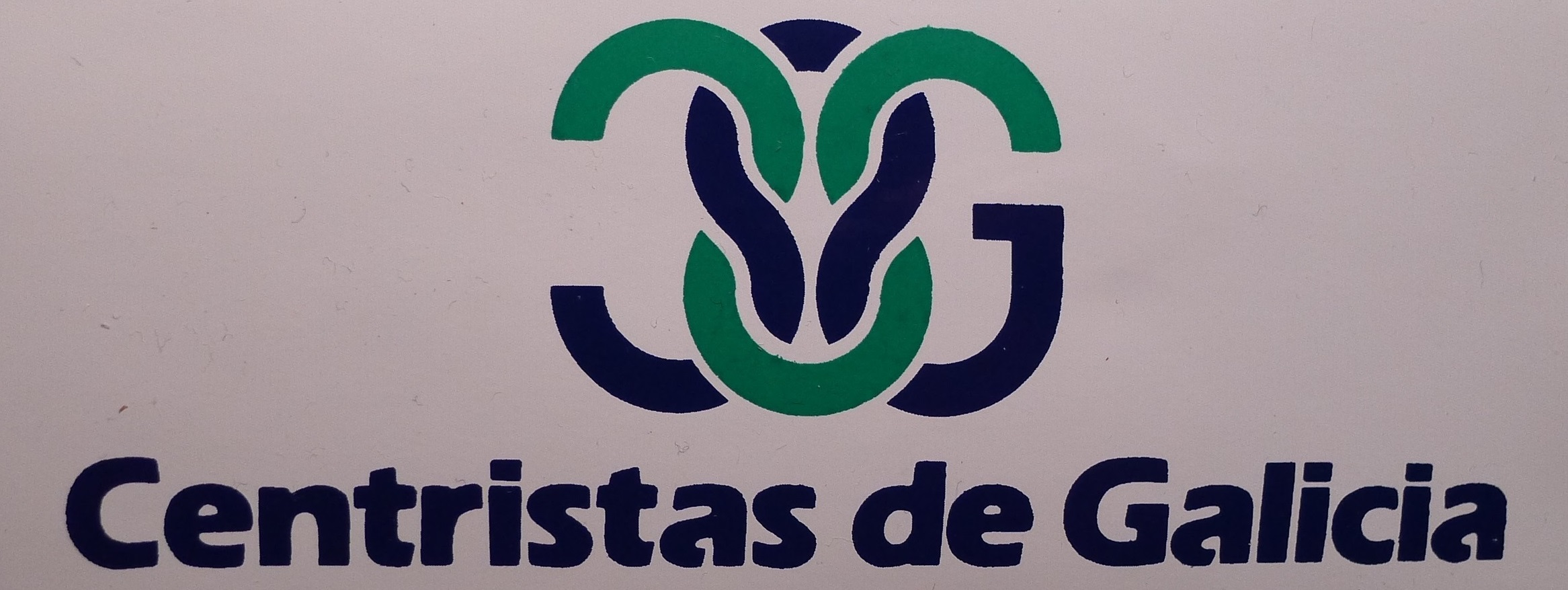 Adhesivo de Centristas de Galicia